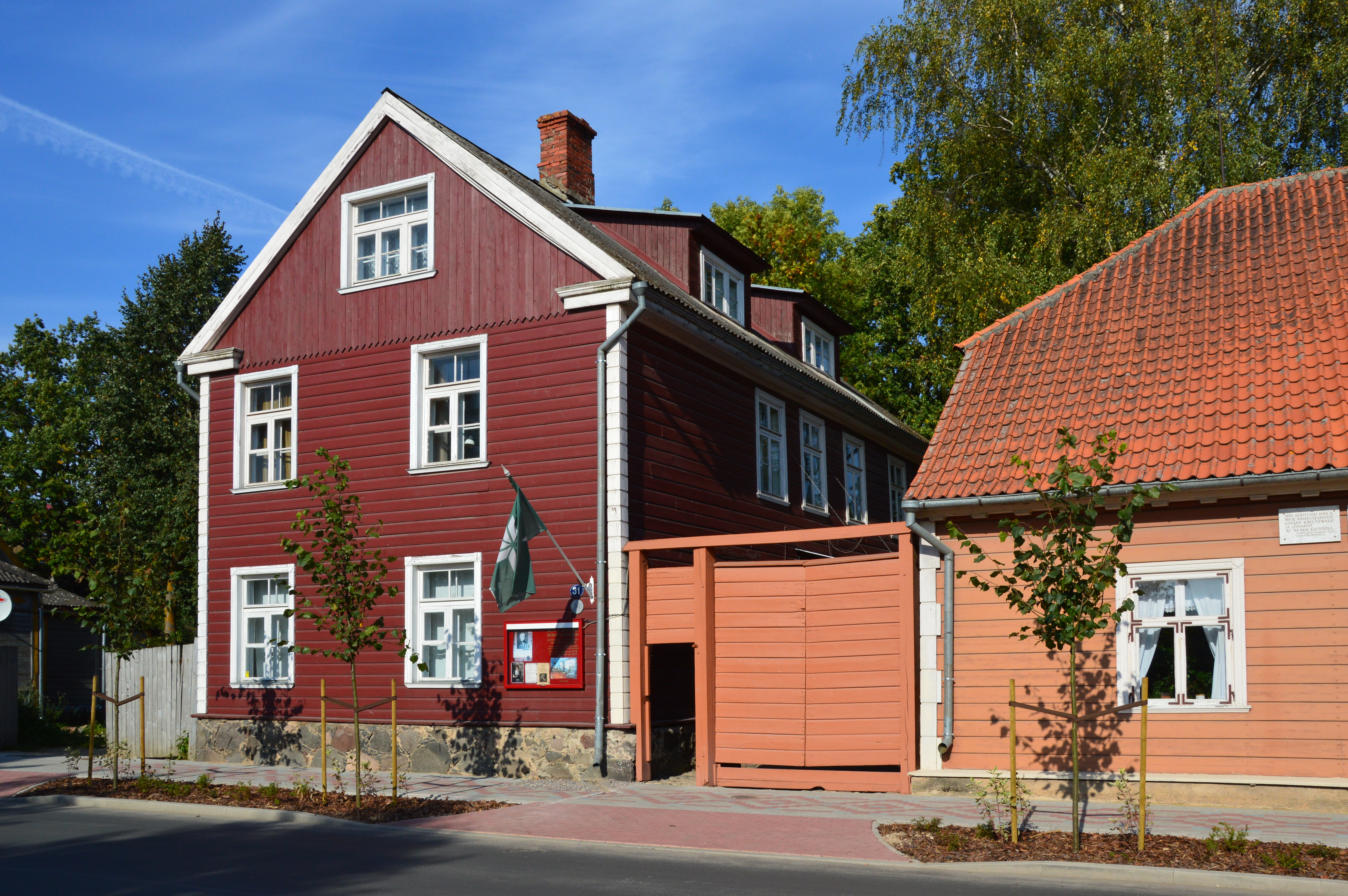 Hoonete kompleks, kus aastail 1833-1877 elas ja töötas Friedrich Reinhold Kreutzwald.